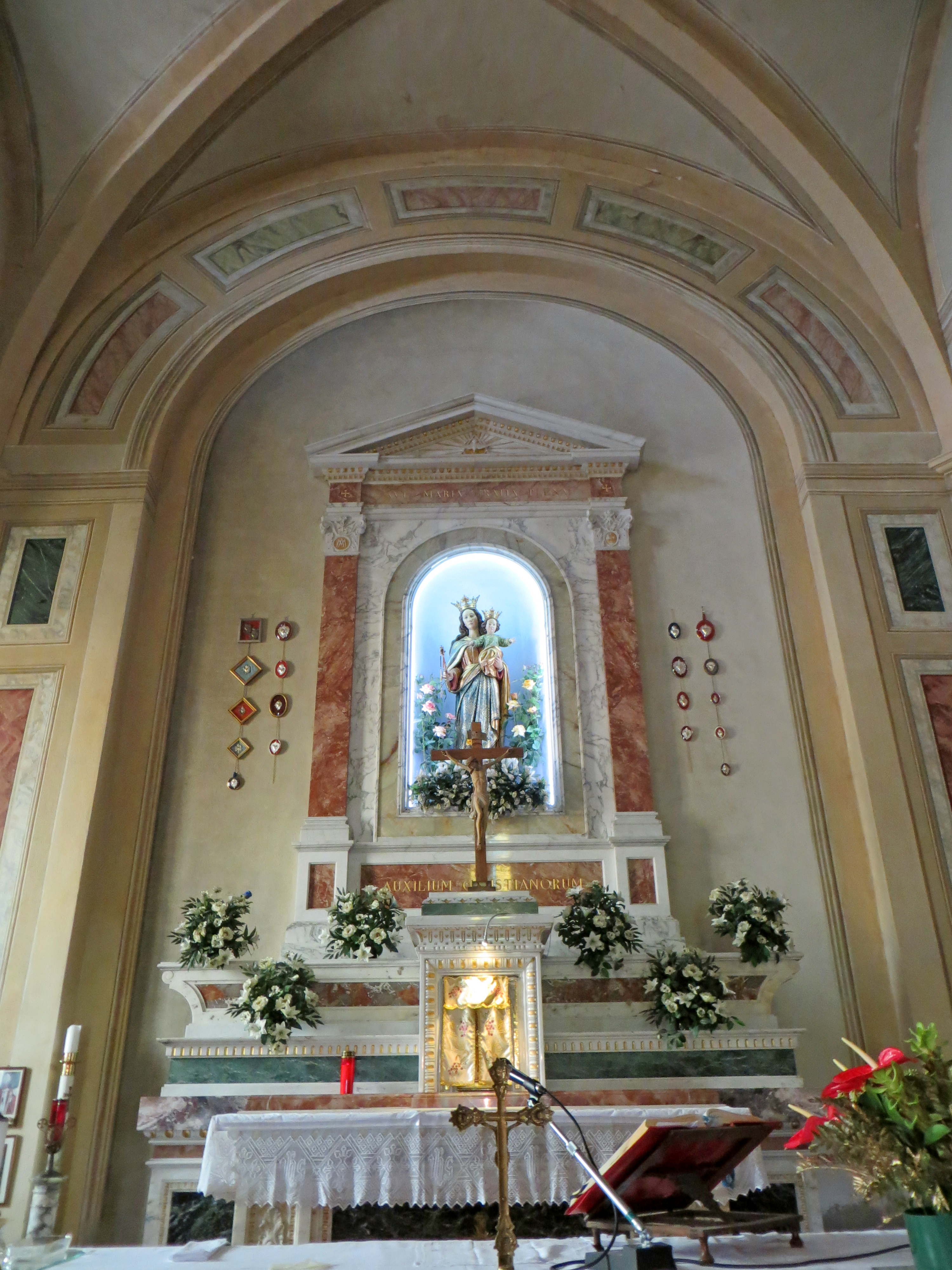 Convento di Santa Maria delle Grazie (Montechiarugolo) - presbiterio del santuario